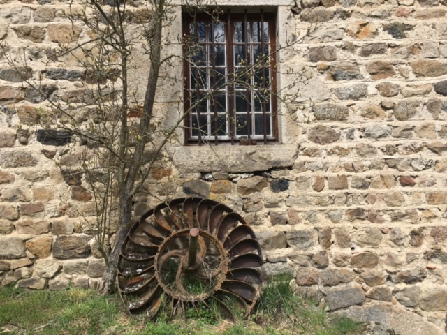 Roue godet Moulin d'Ancette